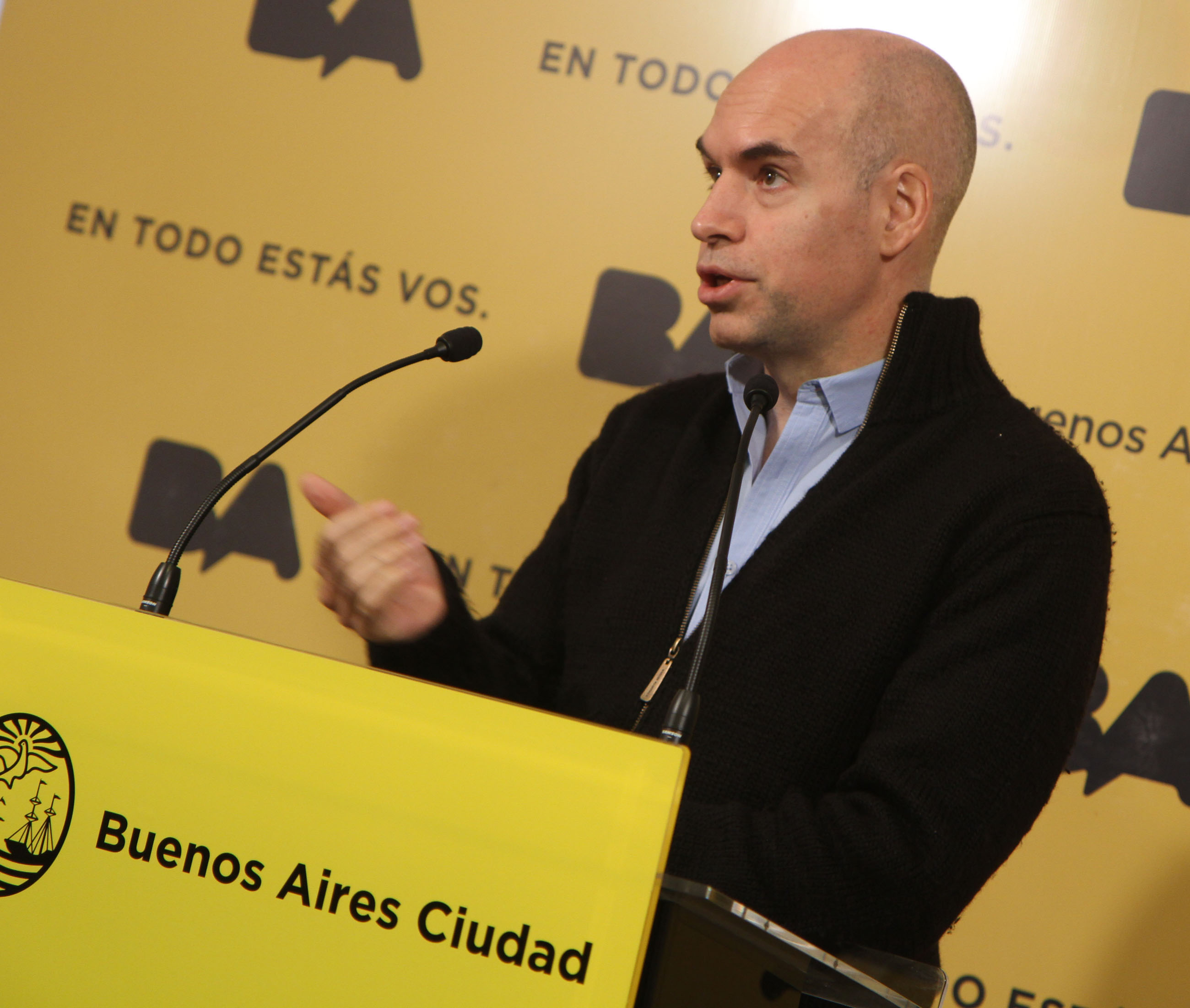 Buenos Aires. Julio 4 de 2012. El Jefe de Gabinete de Minstros del Gobierno porteño, Horacio Rodriguez Larreta, durante la conferencia de prensa que ofreció, luego de la habitual reunión de Gabinete, que se realizó esta mañana en el Club de Pescadores de Costanera Norte. Foto Sandra Hernandez-gv/GCBA.